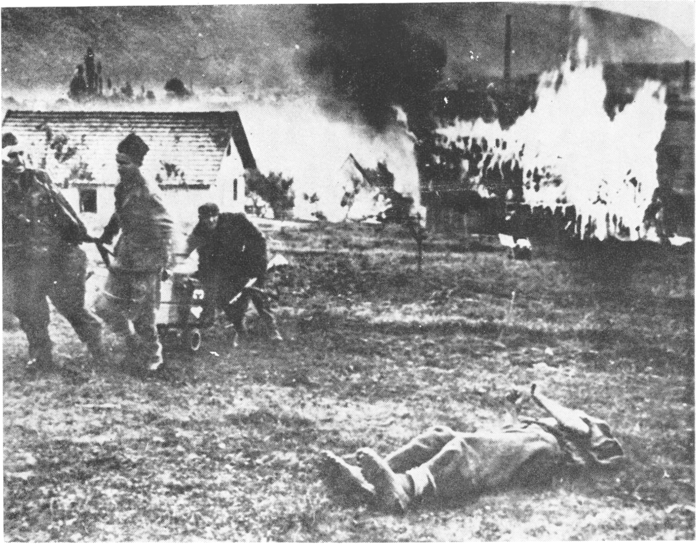 Srpskohrvatski / српскохрватски: Borbe u Drvaru tokom nemačkog desanta 1944.